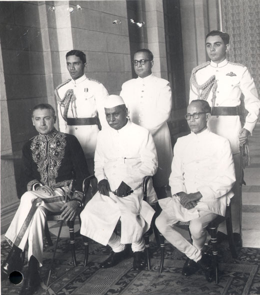 Presentación de cartas credenciales del embajador Miguel Serrano en la India.